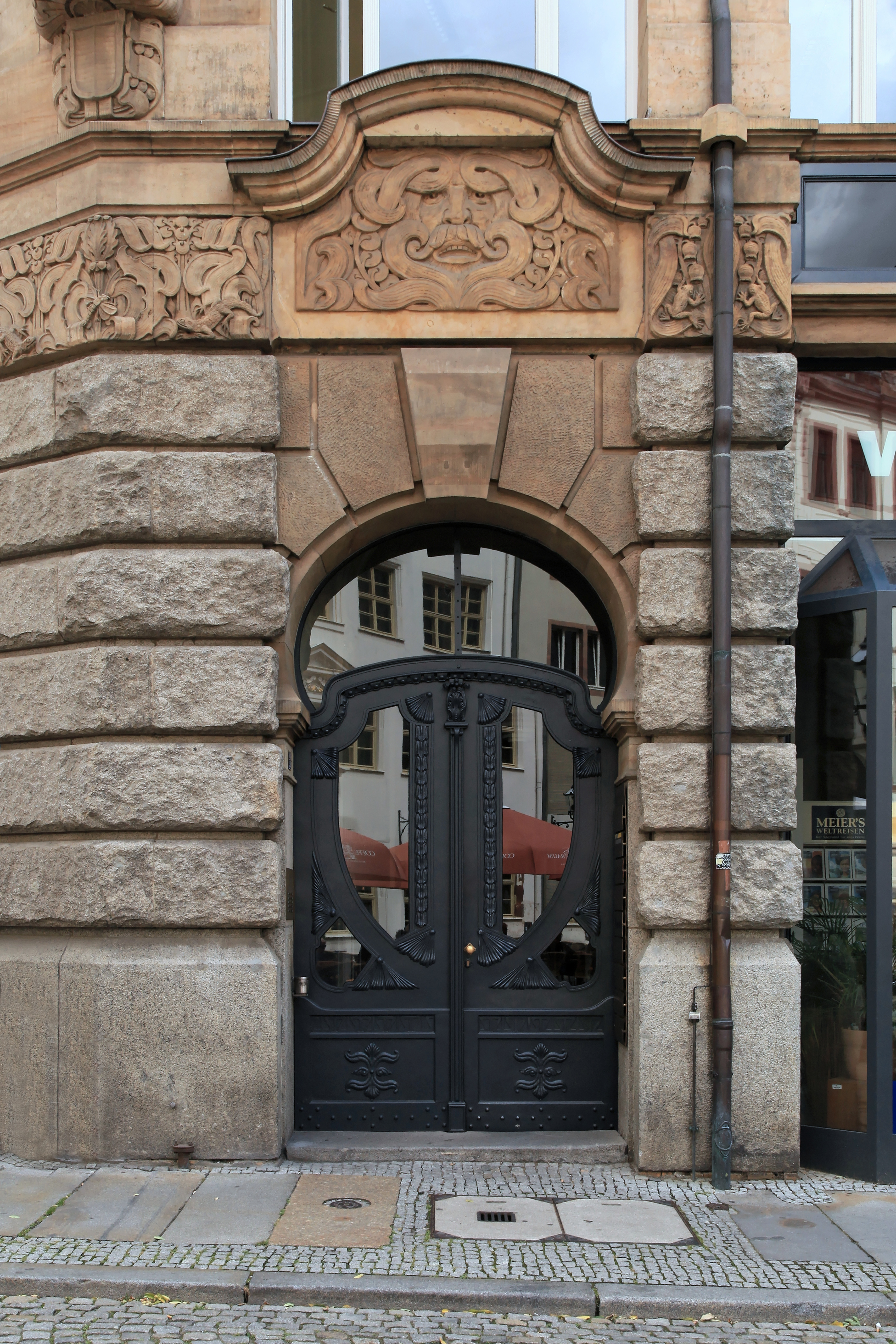 Tür an Barfußgäßchen 11 in Leipzig